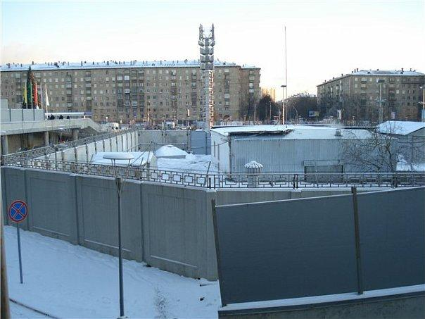 Охраняемый комплекс вентиляционных сооружений системы Д6 (Метро-2) вблизи ТЦ "Капитолий" и вентшахты 126 Московского метрополитена (рядом с метро Университет).